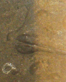 Fossil of Daonella, an extinct mollusc-- Took the photo at Museo dei Fossili di Besano